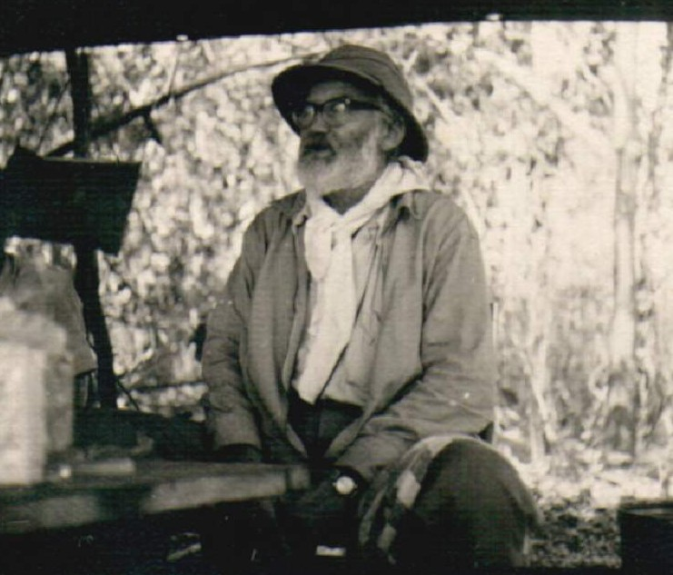 Charles Ventrillon Horber (París – Francia el 26 de febrero de 1889 – Caracas – Venezuela en 1977) retratista, paisajista, dibujante, naturalista y docente de la Facultad de Arquitectura y de la Escuela de Biología de la Universidad Central de Venezuela en donde desempeña su labor de enseñanza del dibujo. Foto tomada en Playa del medio, río Orinoco, estado Bolívar - Venezuela